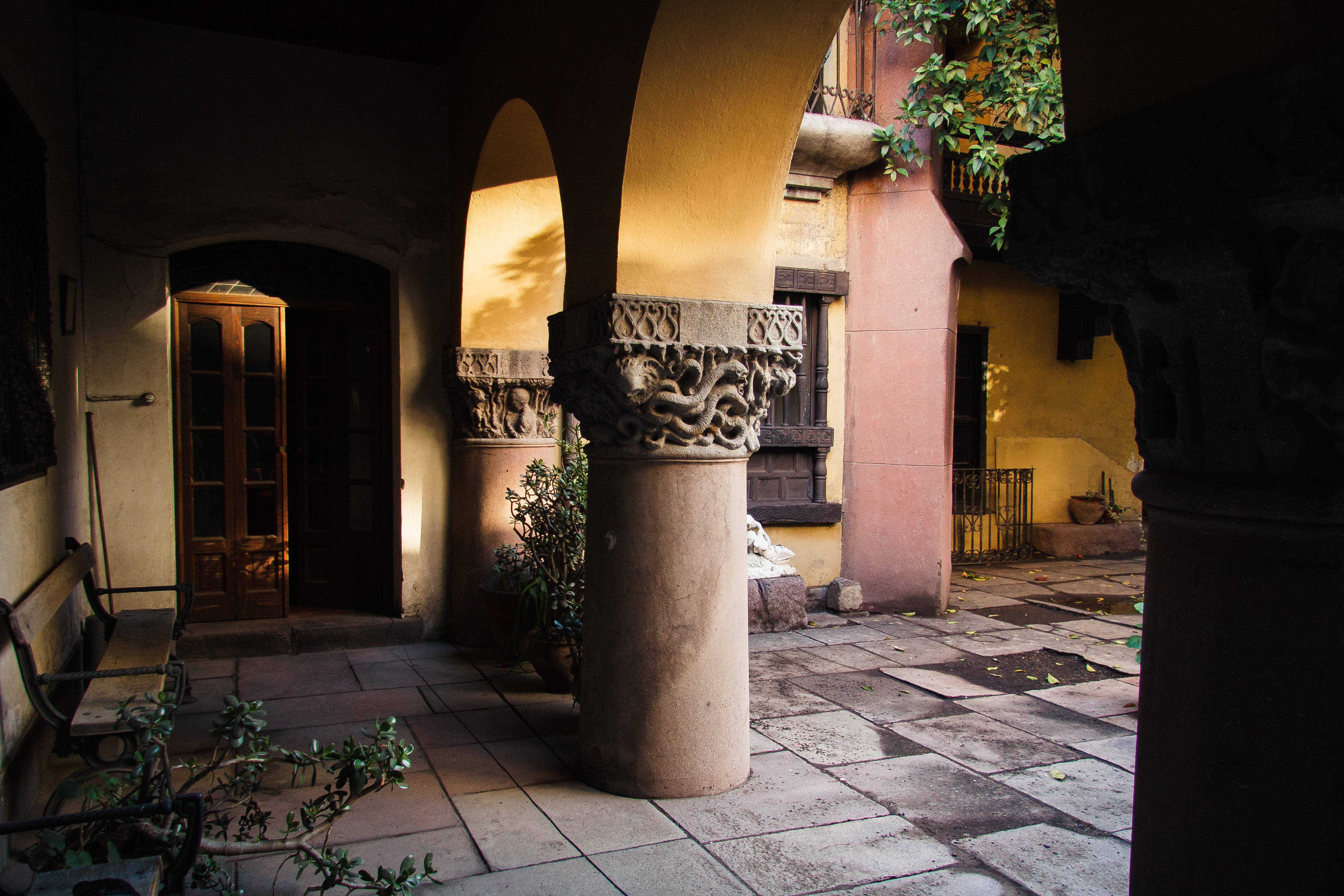 Casa de Los Diez This is a photo of a national monument in Chile: 902